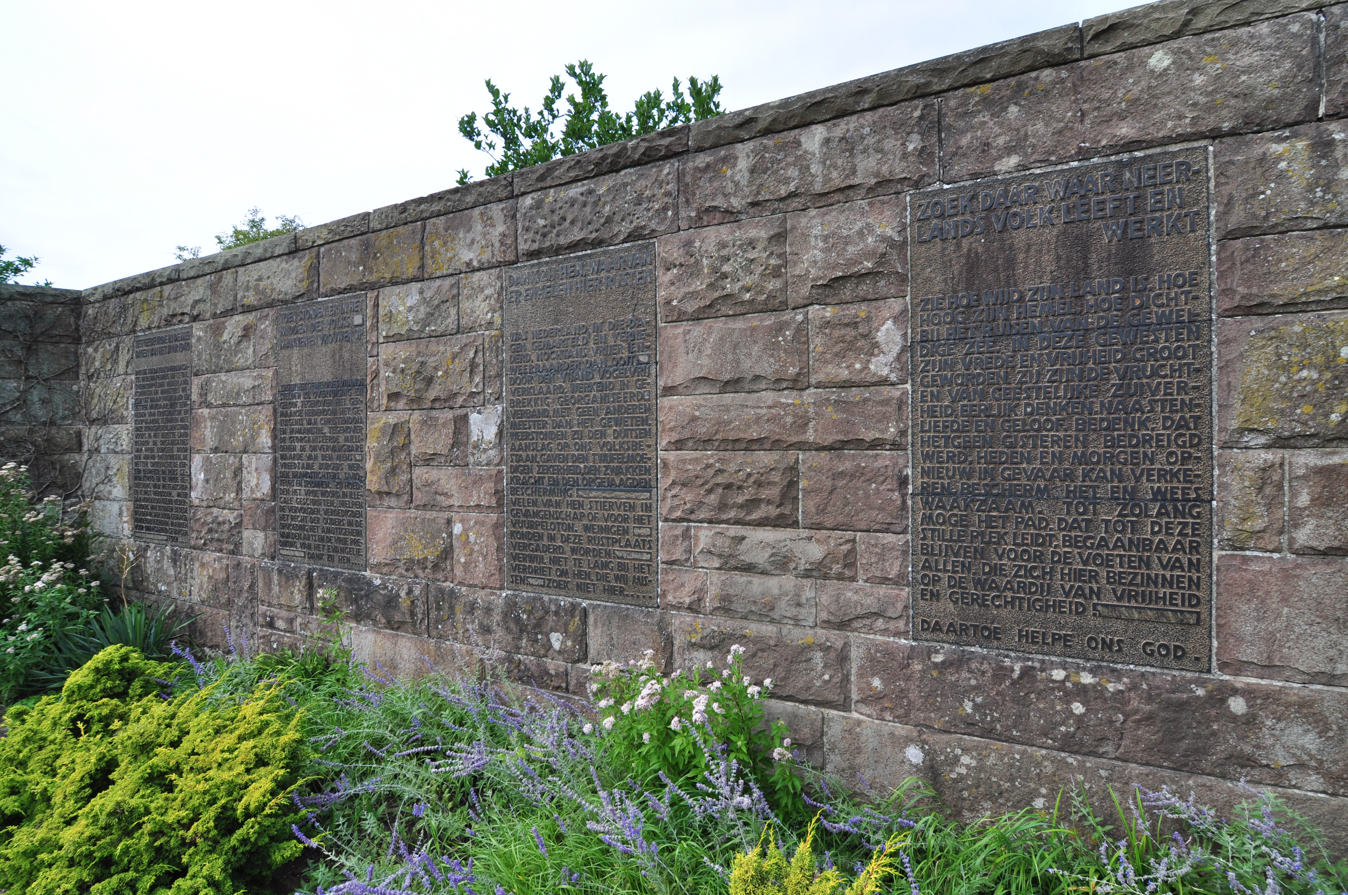 Overzicht van de vier stenen met tekst.